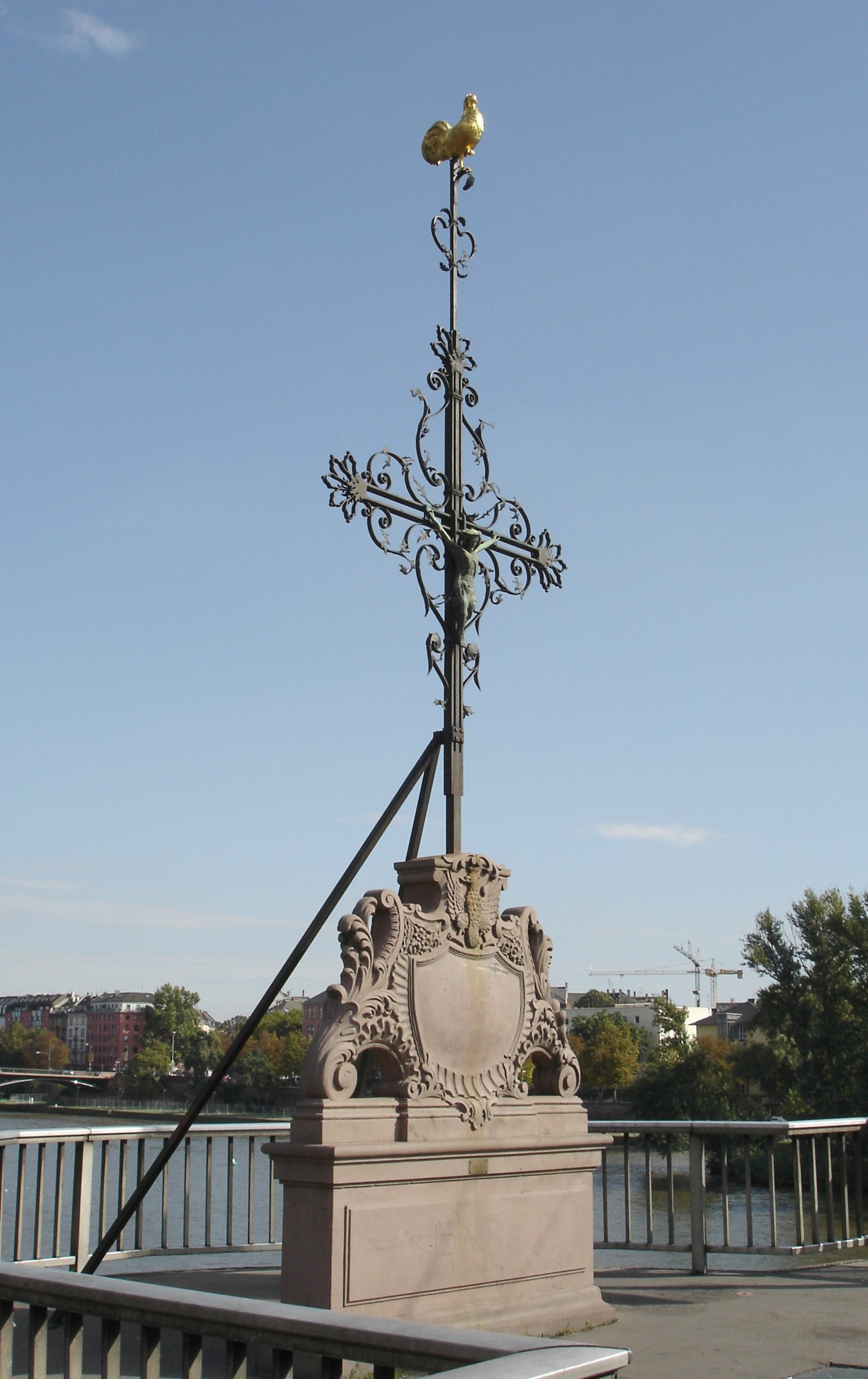 "Brickegickel", Hahn-Büste auf der "Alten Brücke" in Frankfurt am Main